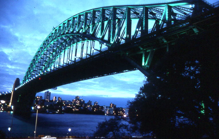 sydney harbour bridge